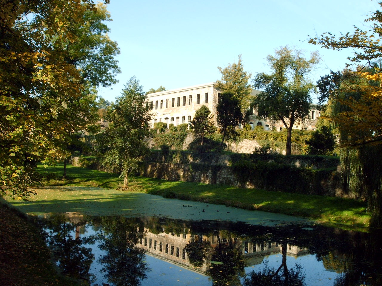 Das Schloss Dahlen, aufgenommen aus dem Stadtpark